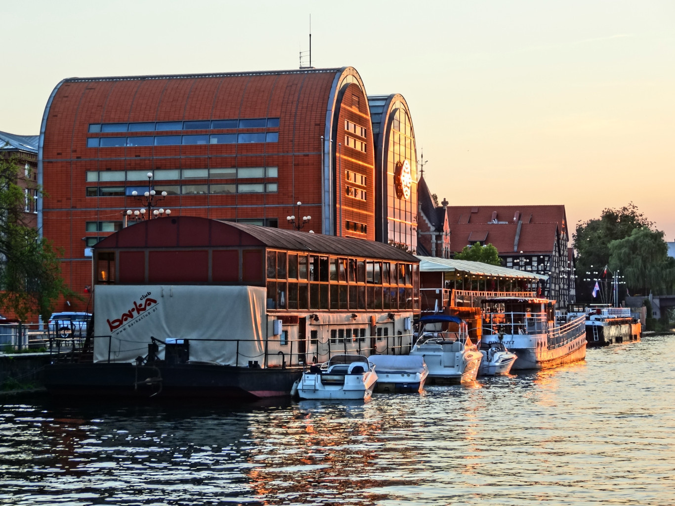 Południowe nabrzeże Brdy w centrum Bydgoszczy